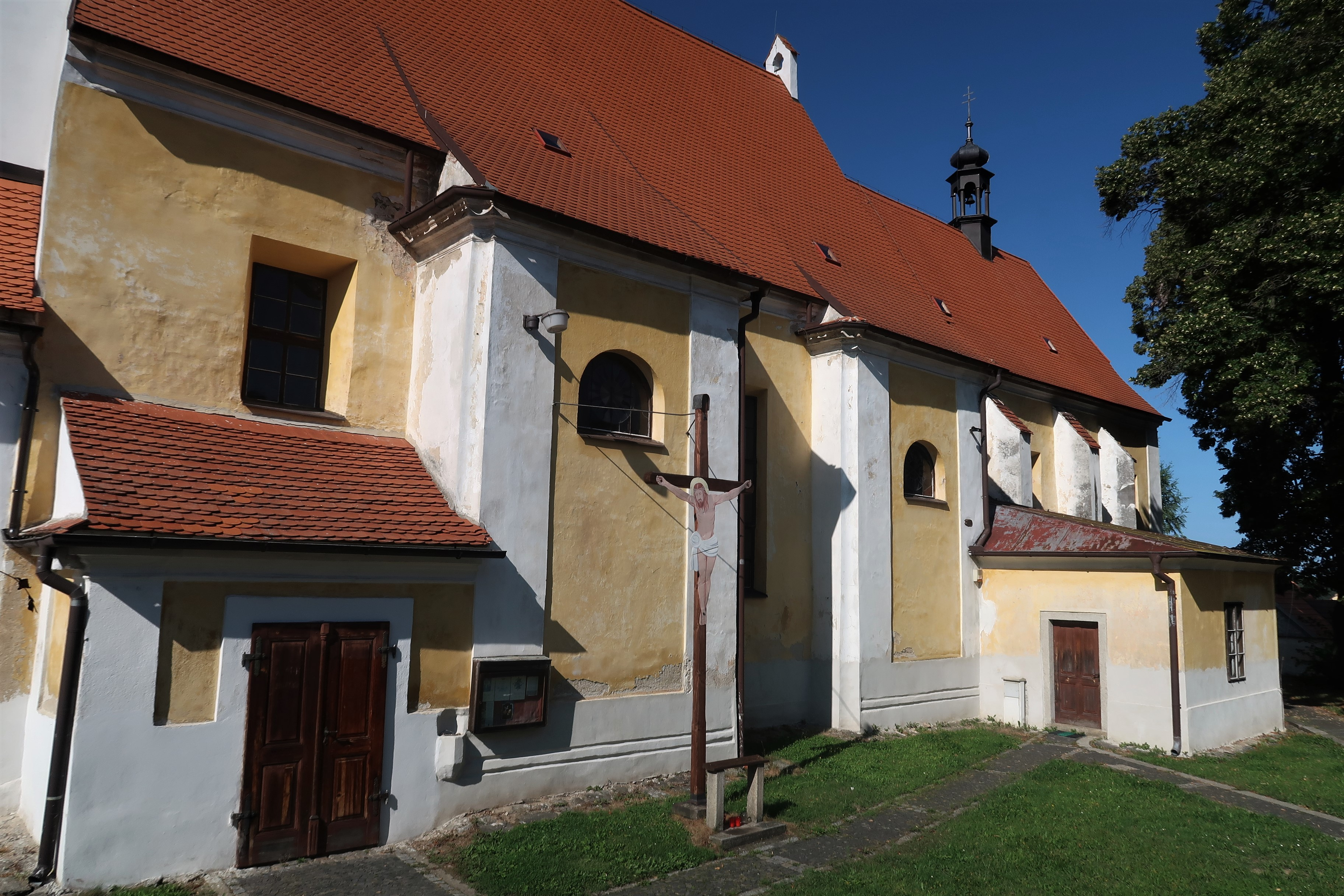 Kostel sv. Václava, pohled od jihu